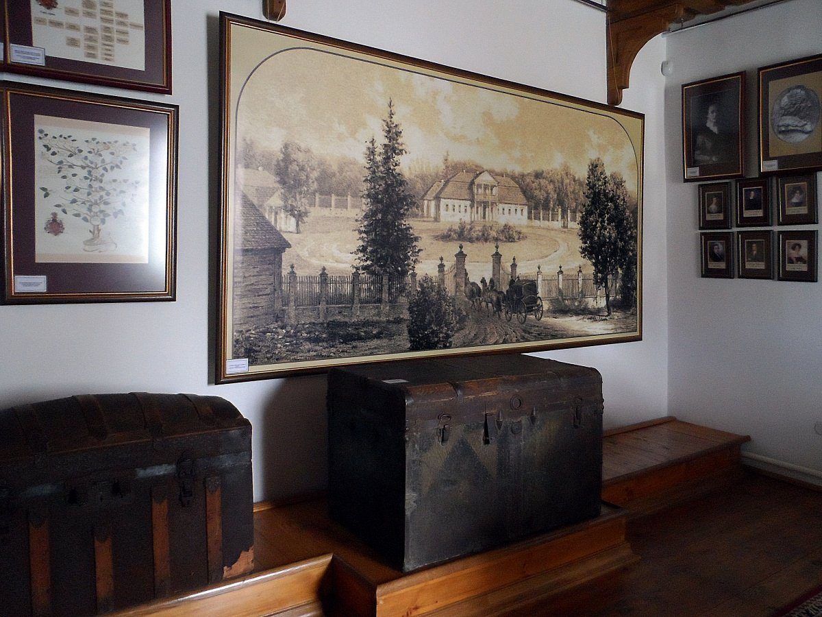 Варацэвічы. Музей. Куфар, знойдзены ў сутарэннях сядзібнага дома Орды